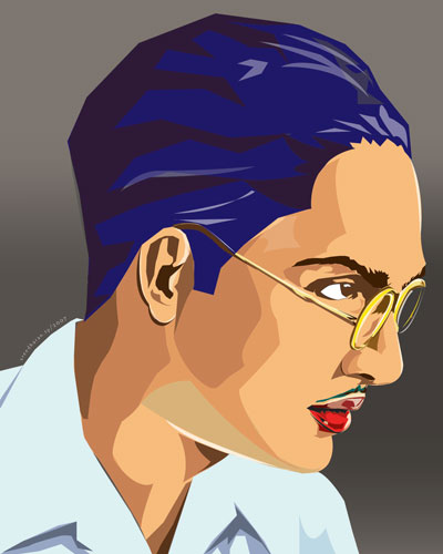 Changampuzha. ഡിജിറ്റൽ വെക്റ്റർ പോർട്രൈറ്റ്